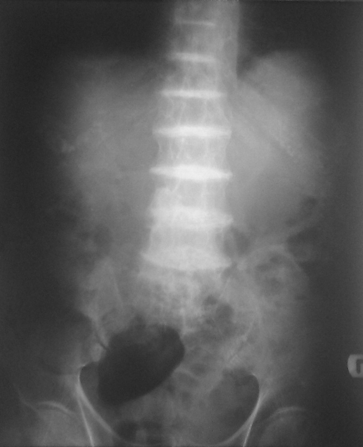 کلسیفیکاسیون دیسک‌های بین‌مهره‌ای در بیمار مبتلا به آلکاپتونوری